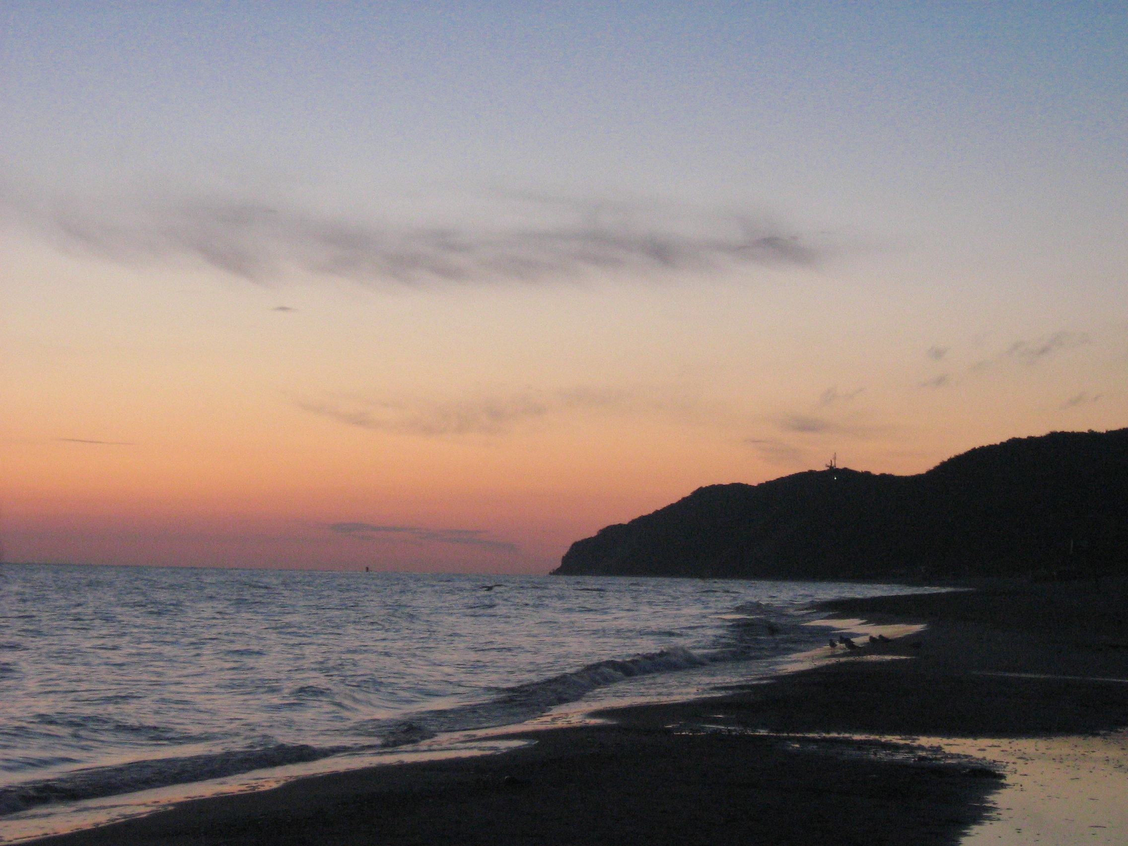 Brzask kalendarzowy nad Bałtykiem (Międzyzdroje).